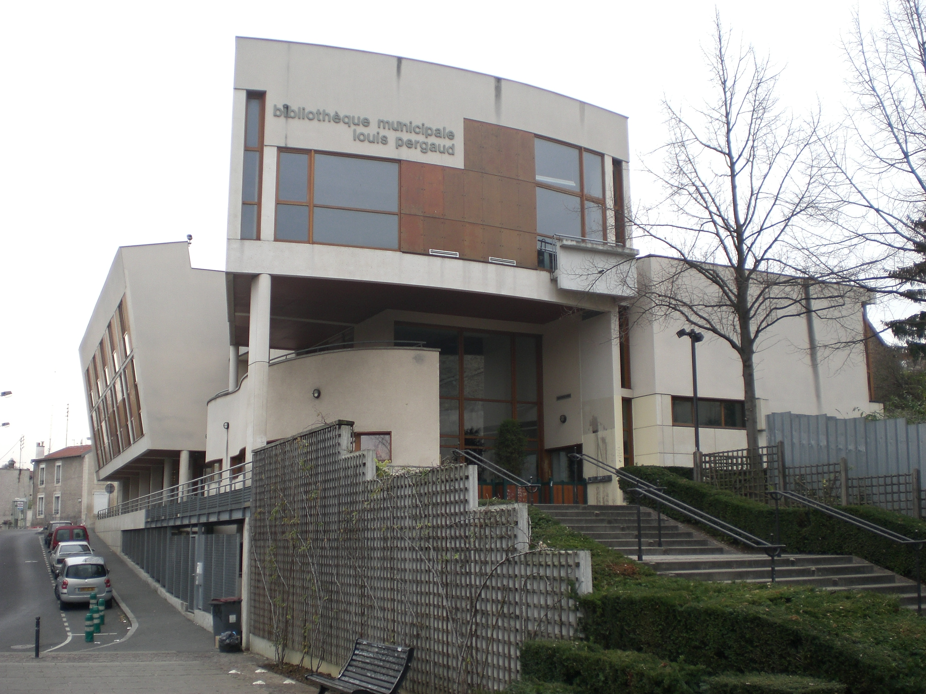 Arcueil, France Médiathèque